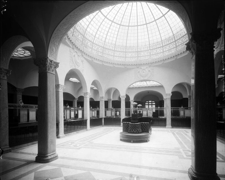 Interiör med lanternin i Göteborgs Bank på Brunkebergstorg 18